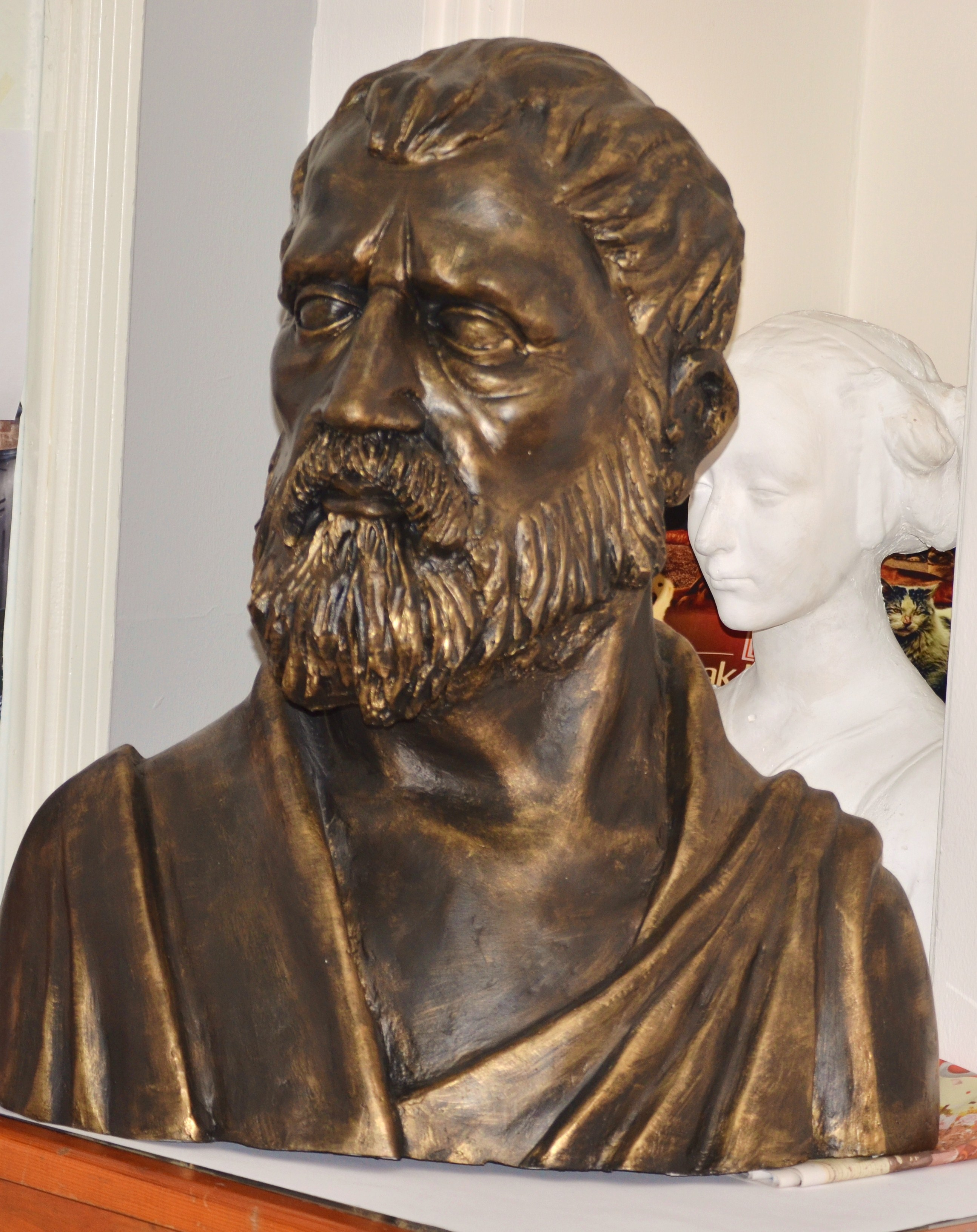 Tarsuslu filozof Zenon büstü. Çukurova Üniversitesi Resim Heykel Bölümü mezunu heykeltıraş Zafer Onan tarafından Aratos dergisi için yapılmıştır. Zenon büstü Tarsus'ta Aratos Kültür Sanatevi'nde bulunmaktadır.